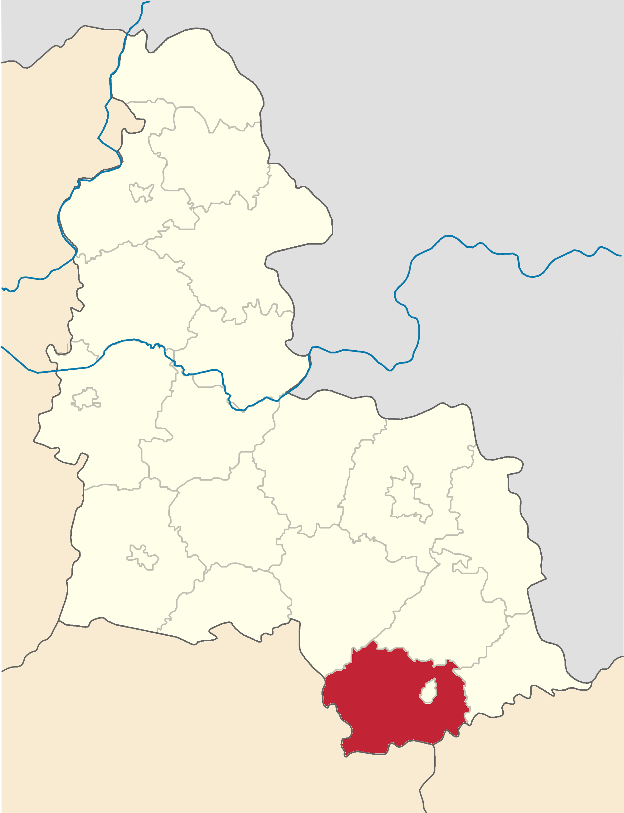 Okhtyrskyi-Raion map